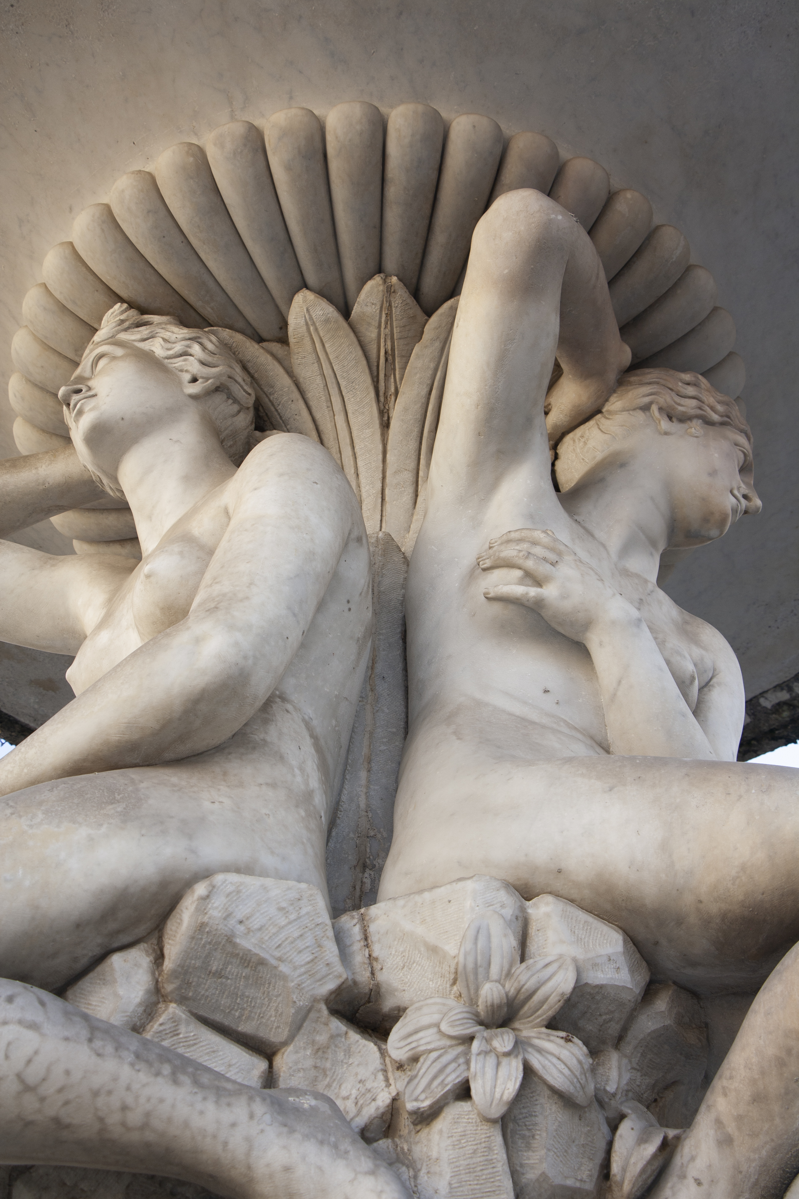 Fontana delle Naiadi o dei Leoni, di Luigi Pampaloni, Luigi ed Ottavio Giovannozzi (1828), situata in Piazza Farinata degli Uberti a Empoli